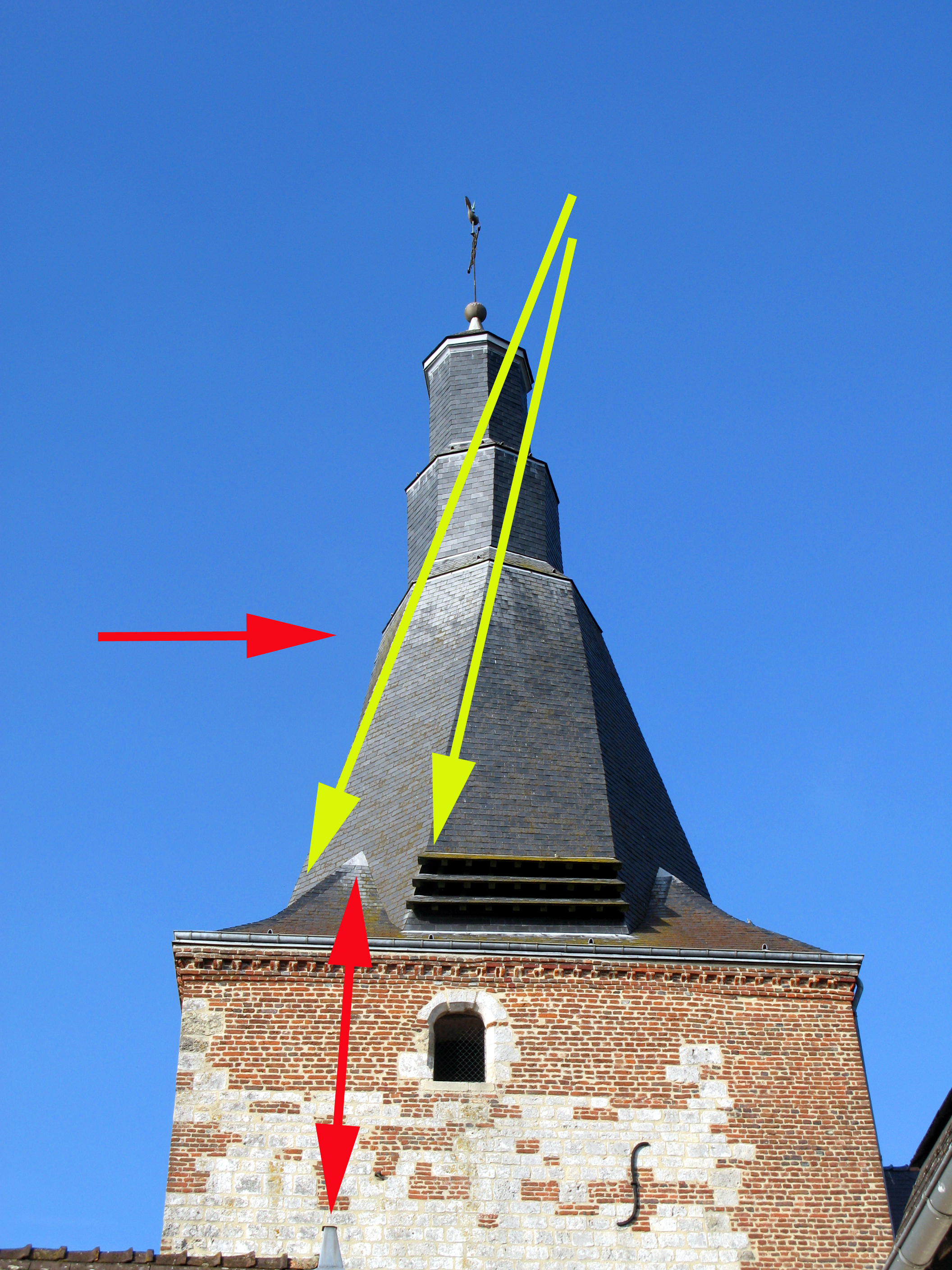 Dohis (Aisne, France) - L'église fortifiée est surmontée d'un «clocher tors» qui présente la particularité de faire profiter l'observateur (selon l'angle de vue ou sa position autour de l'édifice) d'un effet d'optique. La face la plus à gauche de la partie inclinée de la flèche du clocher semble alors avoir des arêtes parallèles. En fait, l'observateur voit parfois à gauche un parallélogramme !